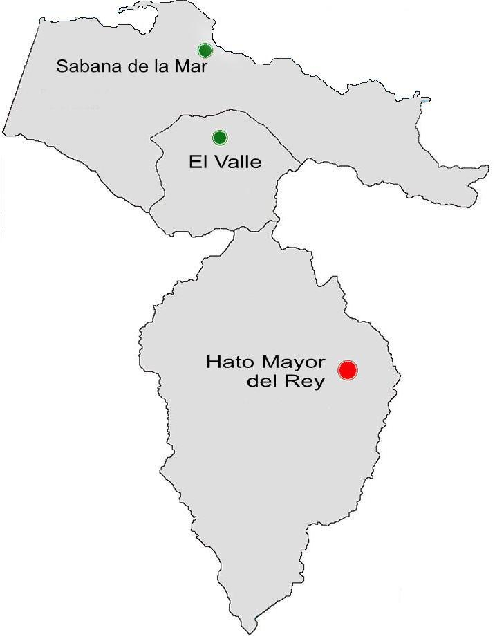 Mapa